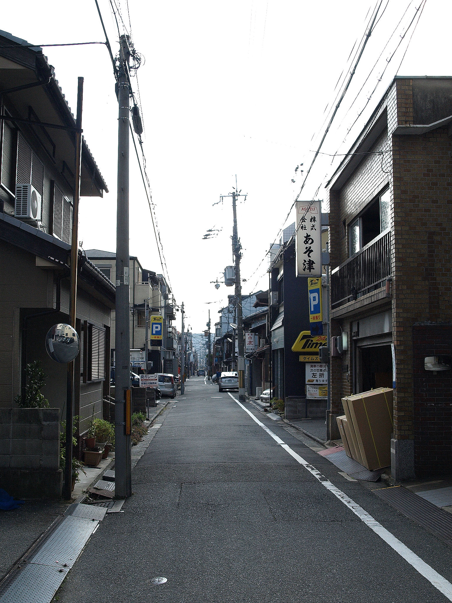 天使突抜三丁目 東中筋通 京都市下京区